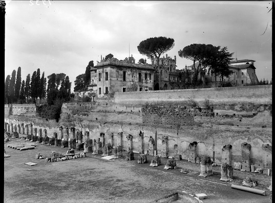 Villa Mills al Palatino, veduta d'insieme dallo stadio palatino